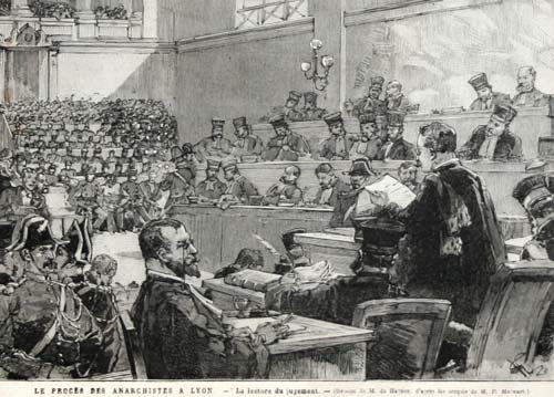 Le Procès des 66, impliquant 66 militants anarchistes, est une affaire politique jugée devant le tribunal correctionnel de Lyon le 8 janvier 1883.